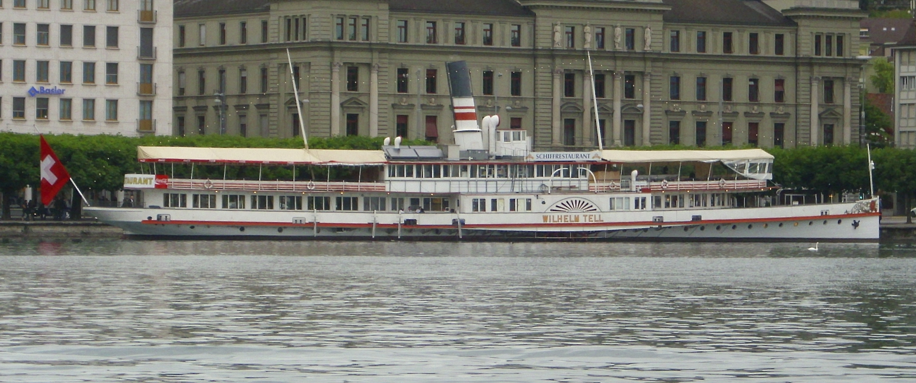 Das Schaufelraddampfschiff "Wilhelm Tell" auf dem Vierwaldstättersee in Verwendung als Schiffrestaurant